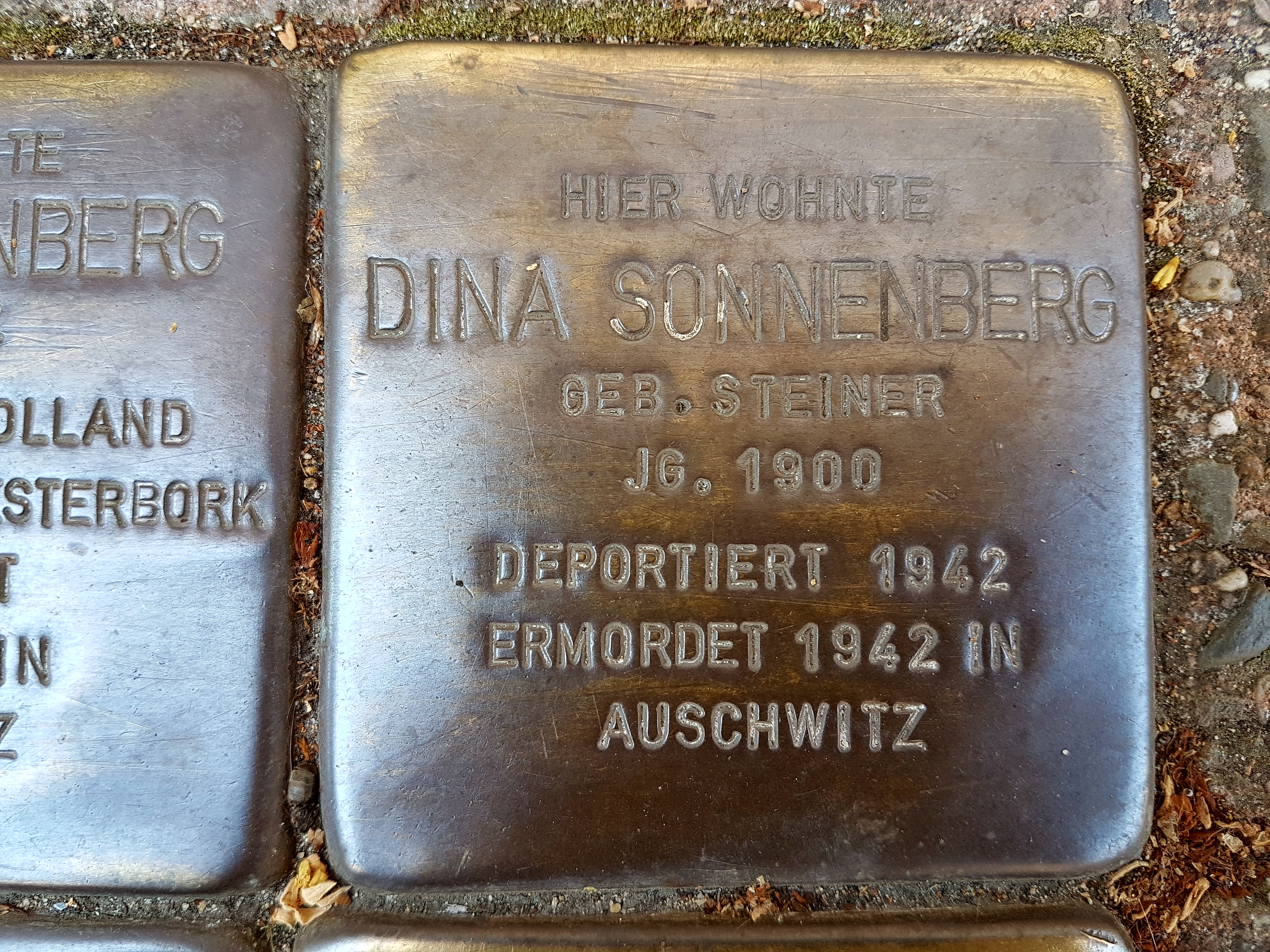 Dina Sonnenberg Stolperstein Duisburg